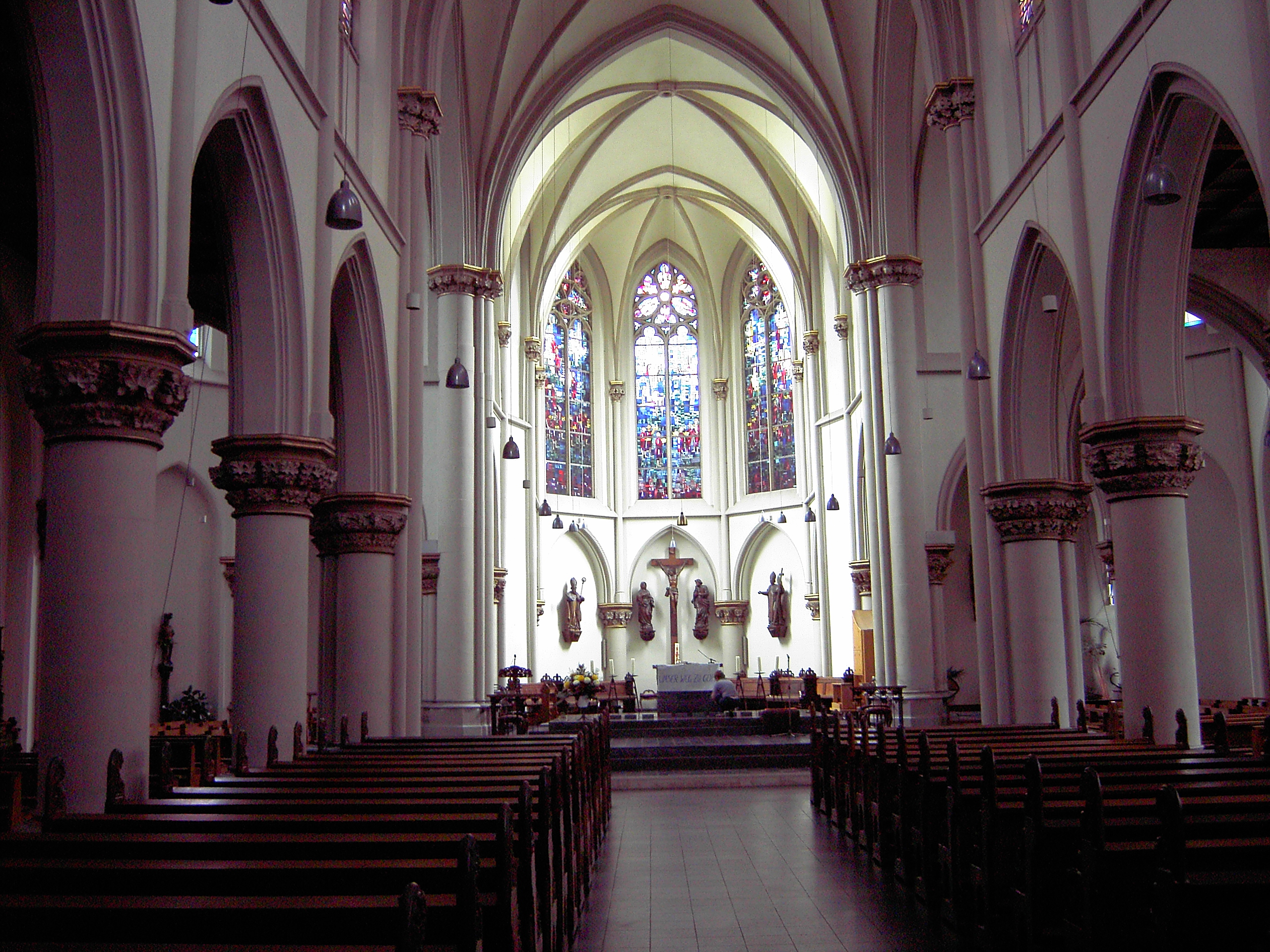 Innenraum der Kirche Heilig Kreuz in Aachen